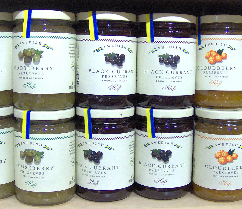 Jam